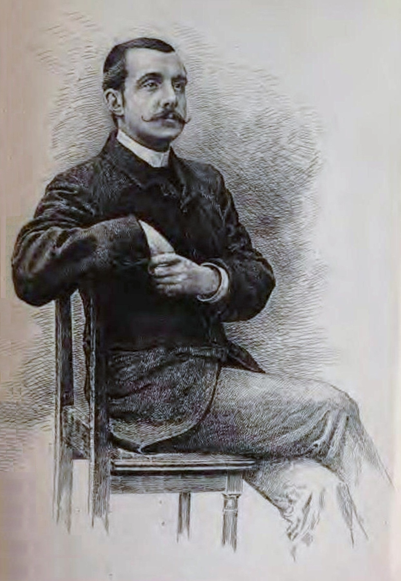 Gravure représentant Cecil Standish, frère d'Henry Standish (1847-1920) et beau-frère d'Hélène de Pérusse des Cars (1847-1933). Grand voyageur, Cecil Standish a écrit plusieurs ouvrages. Il est né à Saint-Germain-en-Laye au château du Val, le 13 août 1852 et meurt à Hyères, le 22 février 1891. Cecil Standish est inhumé dans le caveau de la famille de Noailles, ducs de Mouchy et de Poix, au château de Mouchy-le-Châtel.